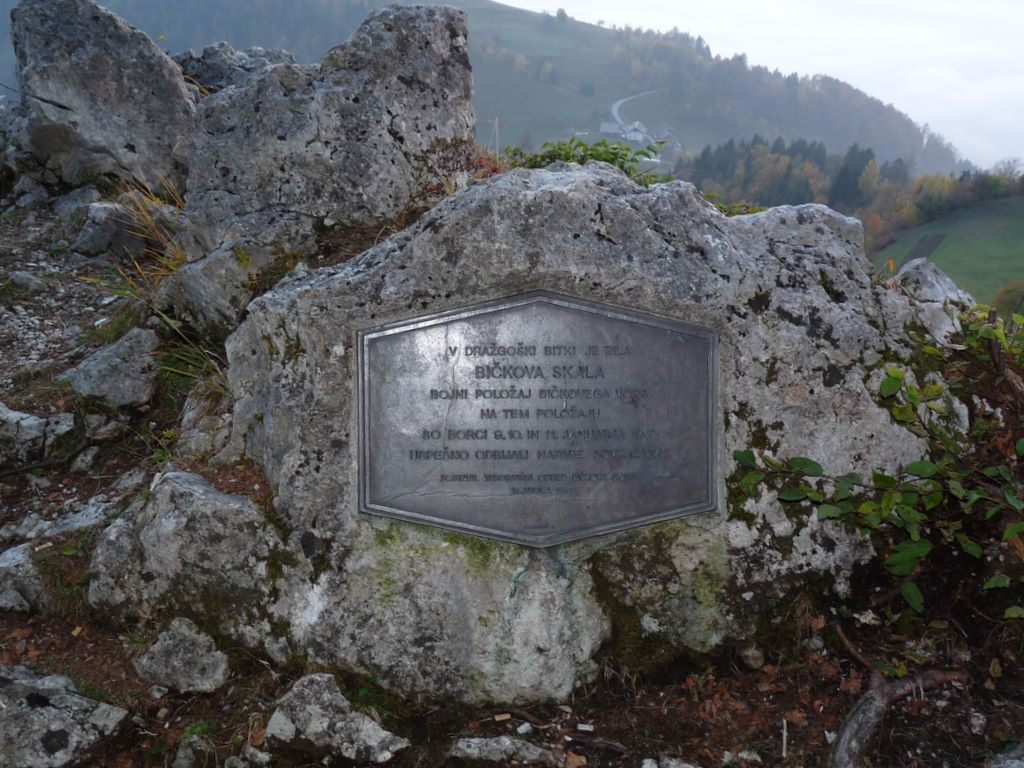 Bičkova skala, bojni položaj v dražgoški bitki 9.-11. januarja 1942